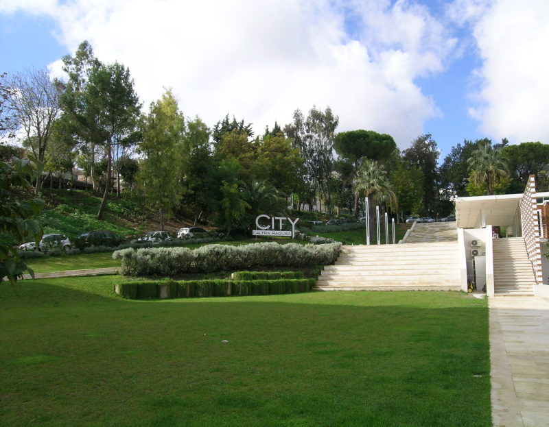 Giovanni Paolo II Park, Ragusa